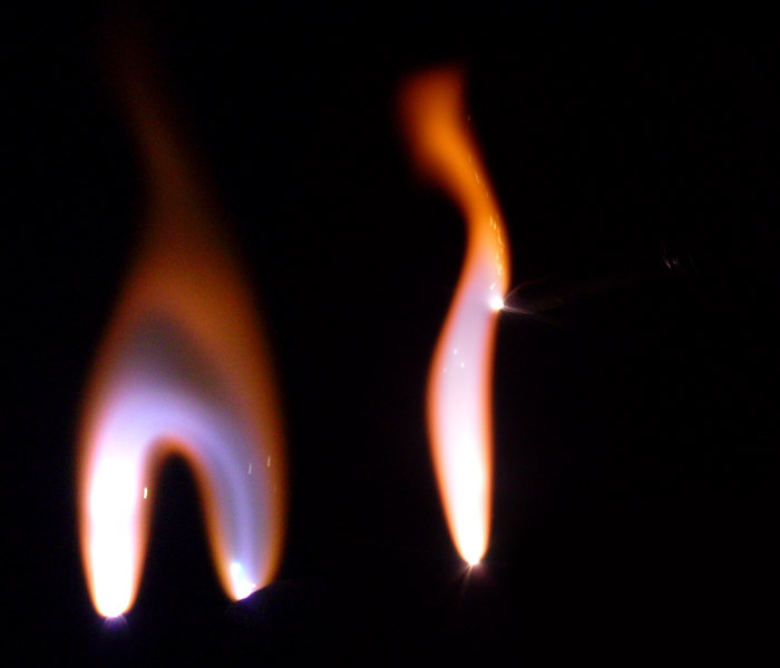 Lichtbogen mit 2000 Volt Gleichspannung bei 0,7Ampere